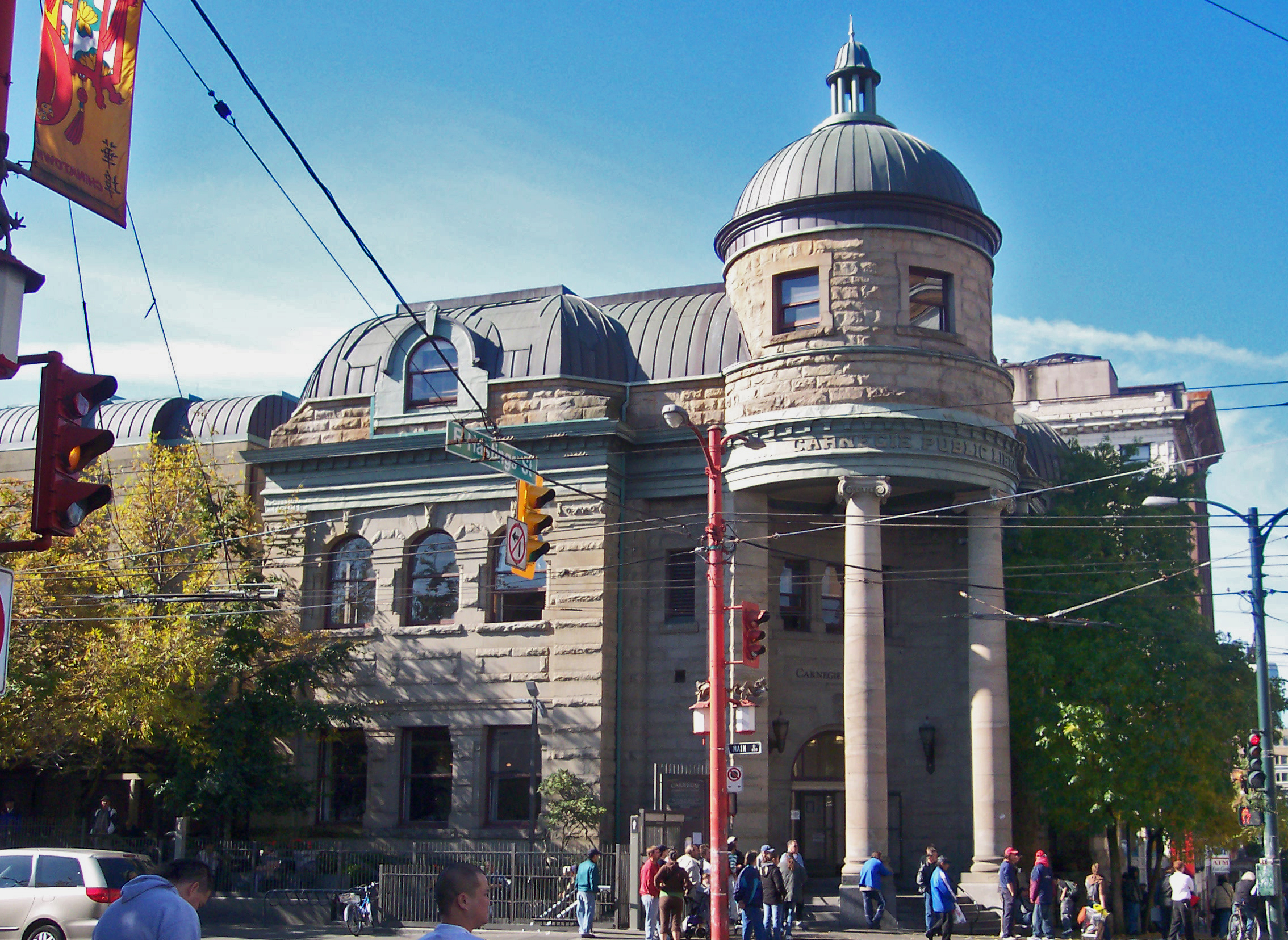 Carnegie Community Centre, Vancouver, BC, Canada